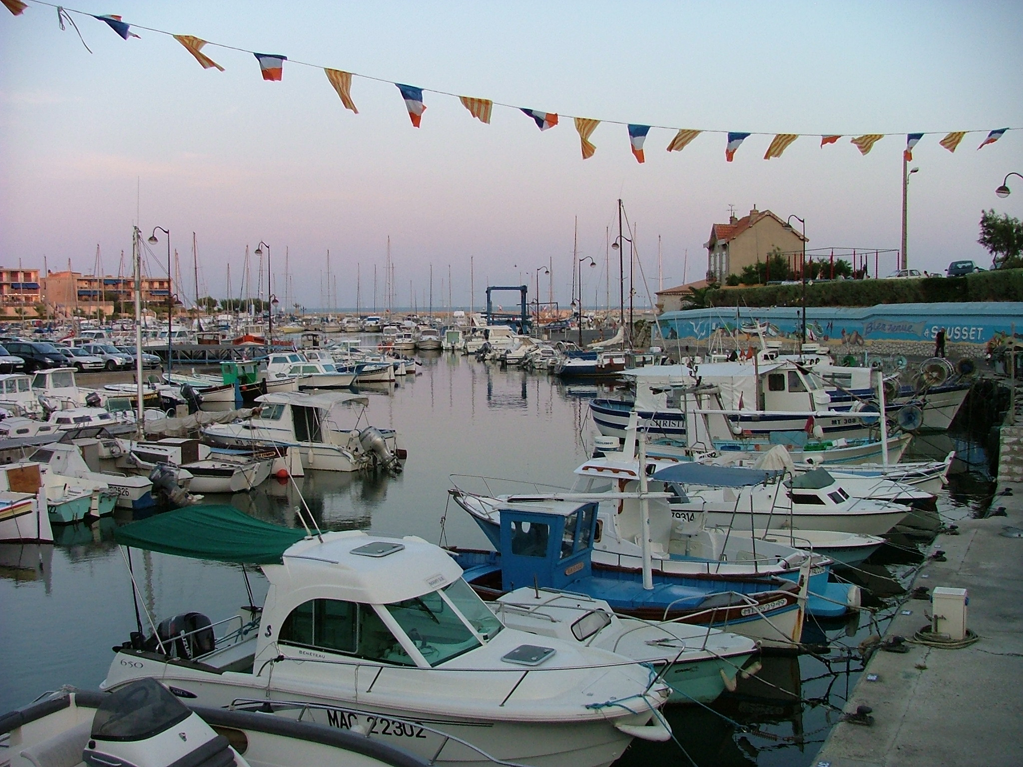 Description Vue du port de Sausset-les-Pins, Bouches du Rhône, France The Harbour of Sausset-les-Pins (a small city near Marseille) Source J'ai moi-même pris cette photo à l'aide d'un appareil Fujifilm S5000 I have taken this photo myself with a Fujifilm S5000 camera. Date 07/2006 Auteur TL Permission Vous pouvez utiliser cette image suivant les termes de la licence Creative Commons. You can use this picture under the rules of the Creative Commons Licence. Autres versions de cette image Pas d'autres versions connues No other version known.